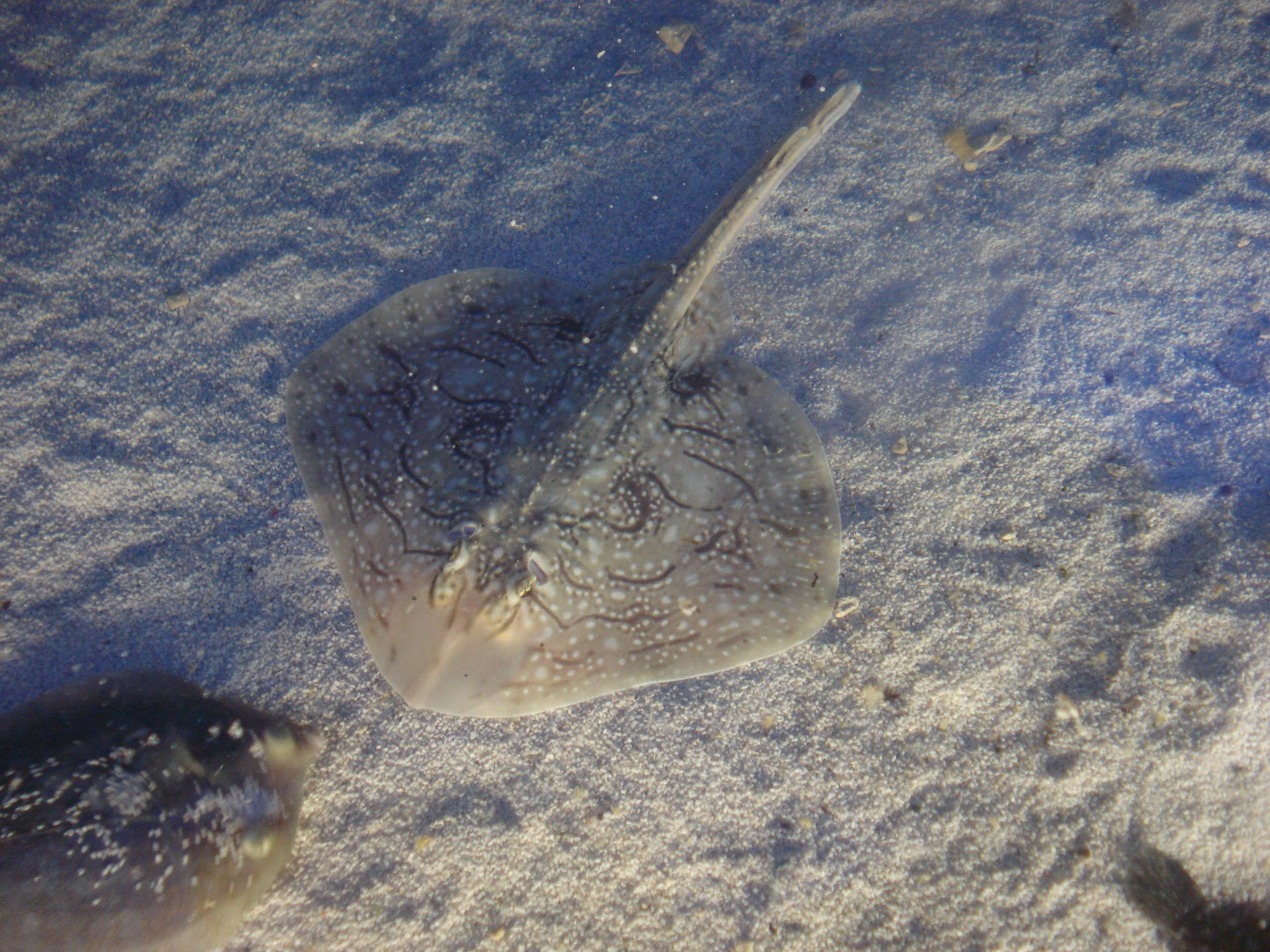 Vasca dell'acquario di Genova